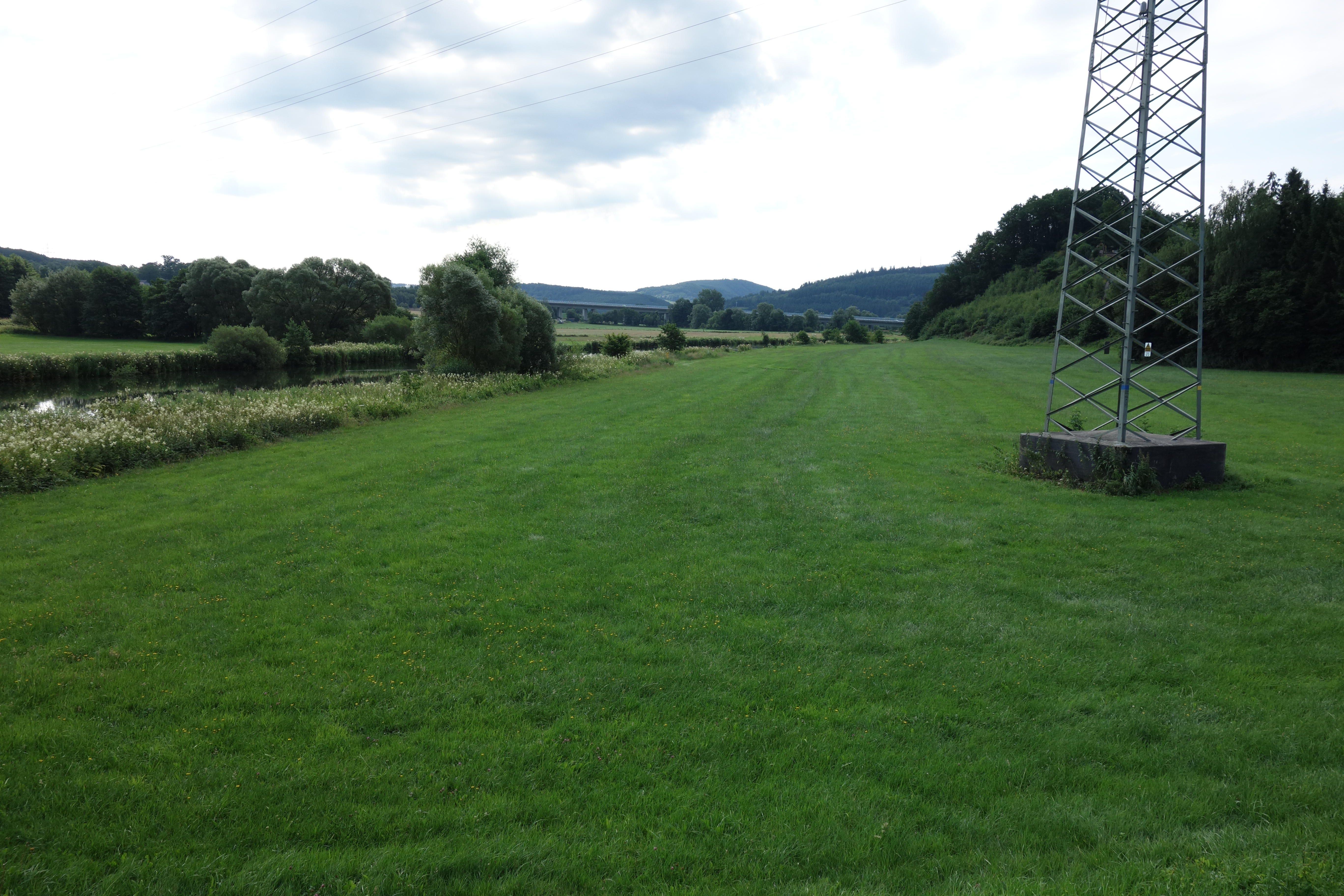 Grünland gehört zum "Landschaftsschutzgebiet Ruhrtal und Wennetal bei Wennemen", Bäume rechts gehören zum LB Aeppel, und Wald im Hintergrund zum Landschaftsschutzgebiet Meschede. Im Hintergrund auch Autobahnbrücke der A 46. Vorne Freileitungsmast (Bl. 1528 M50, 110 kV). Bild von Standort westlich von der Ruhrbrücke Olpe aufgenommen.